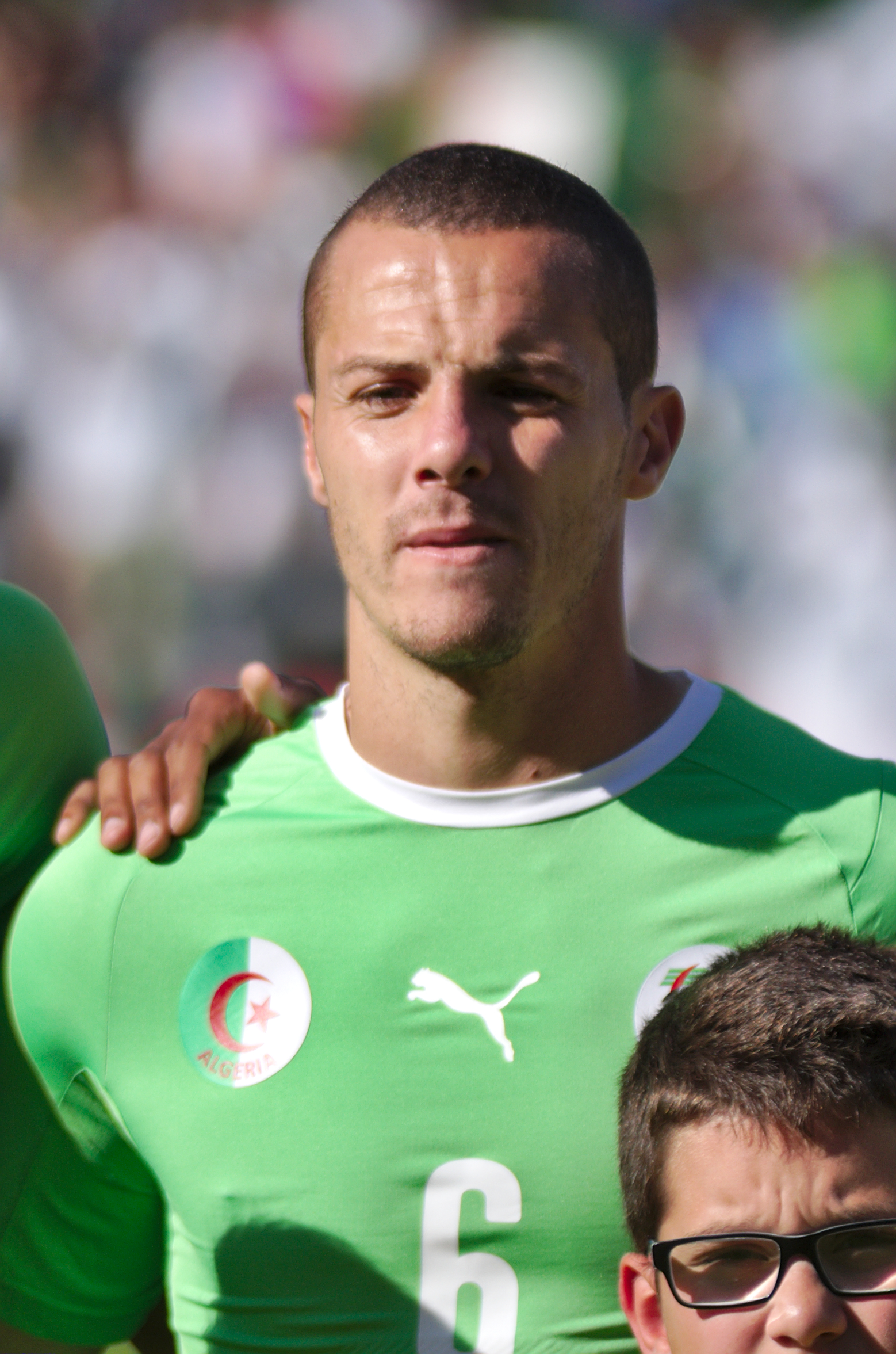 Algérie - Arménie - 20140531 - Djamel Eddine Mesbah